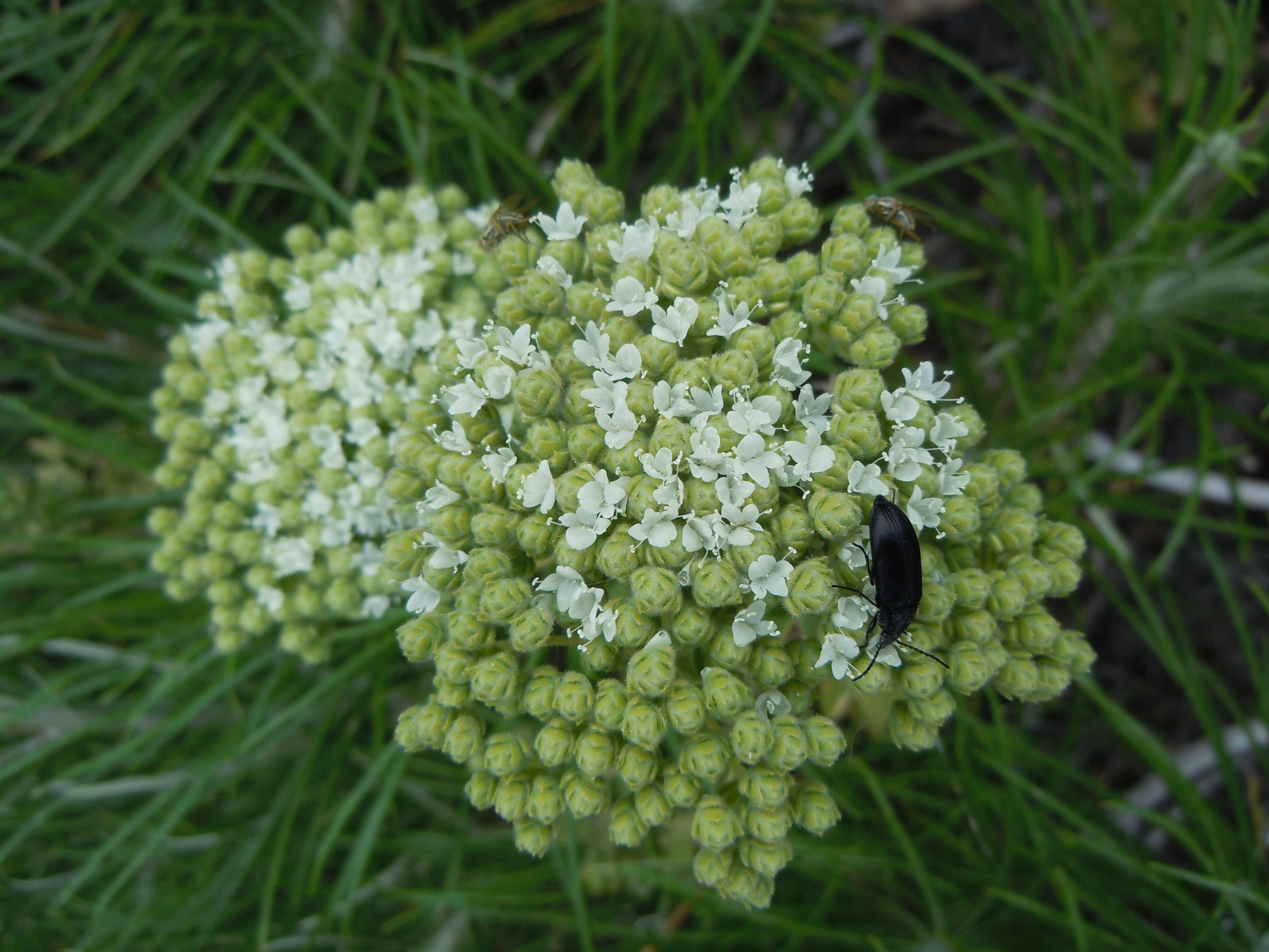 Inflorescence d'Origanum onites à Monemvassia